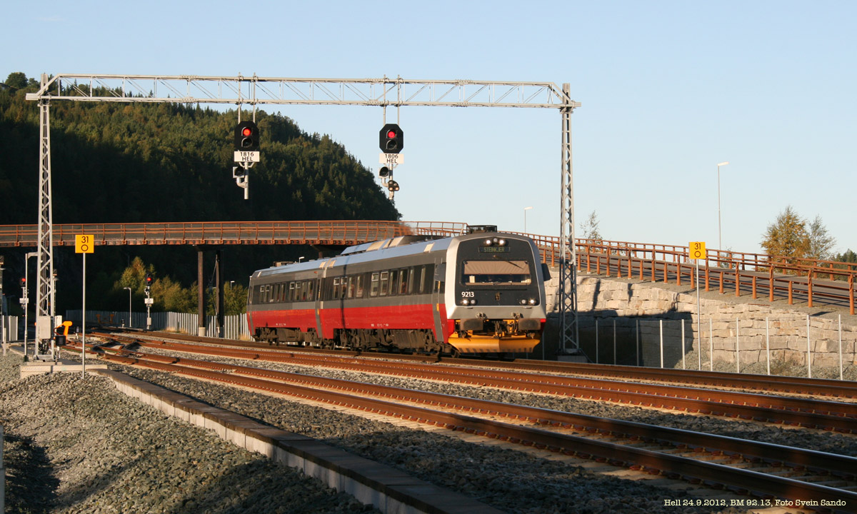 Hell, Trønderbanen